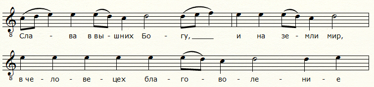 Великое славословие знаменного распева (фрагмент)